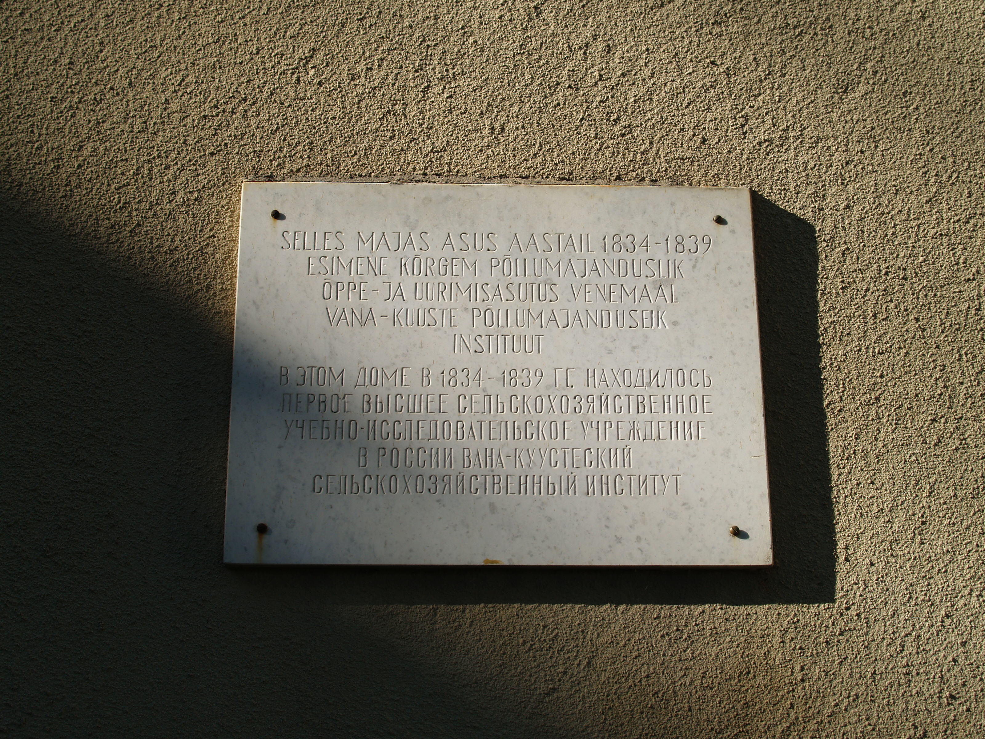 Vana-Kuuste Põllumajanduse Instituut